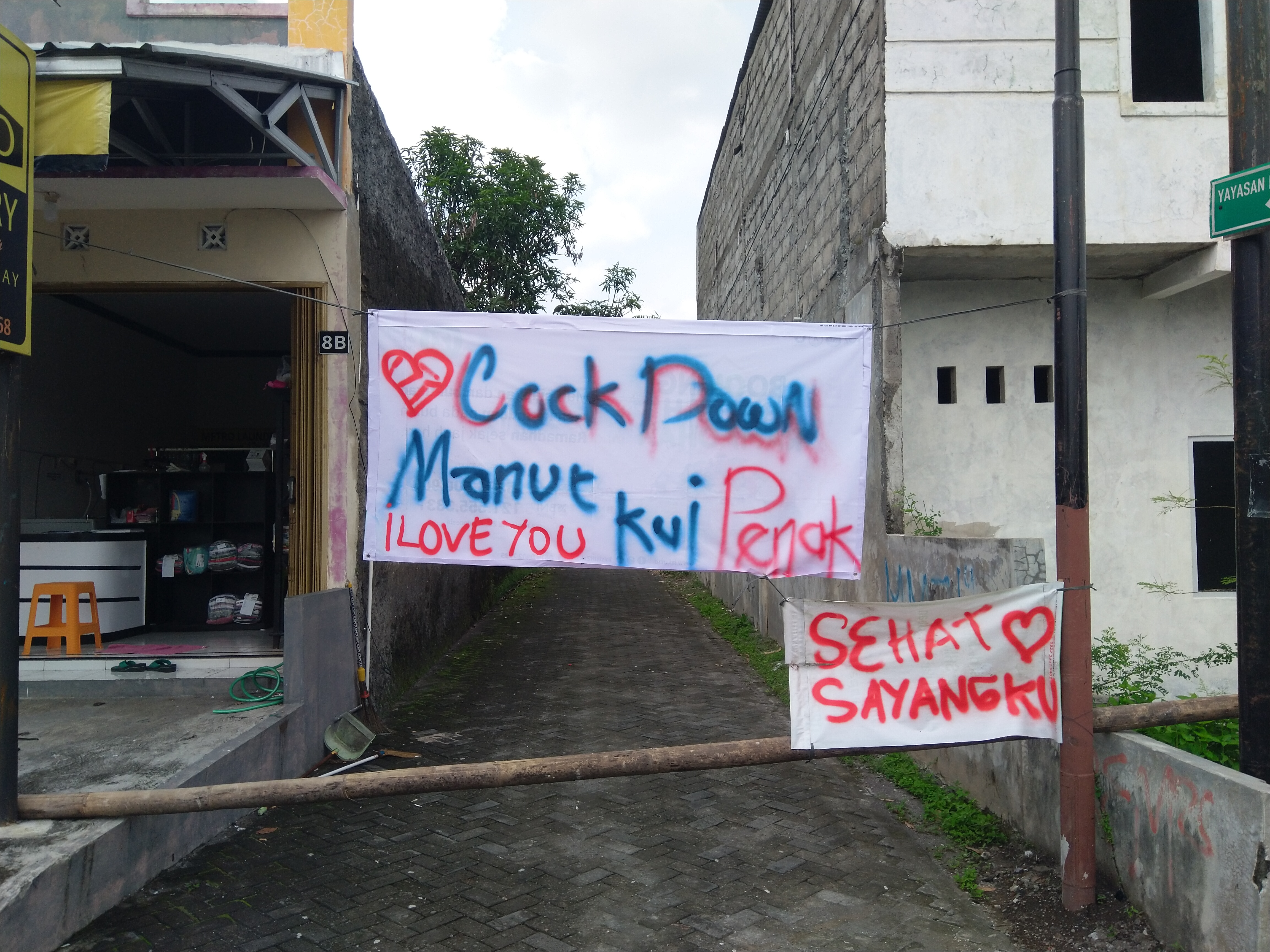 Swakarantina wilayah di Kecamatan Ngaglik, Kab. Sleman, yang dilakukan oleh masyarakat terkait pandemi virus korona di Indonesia